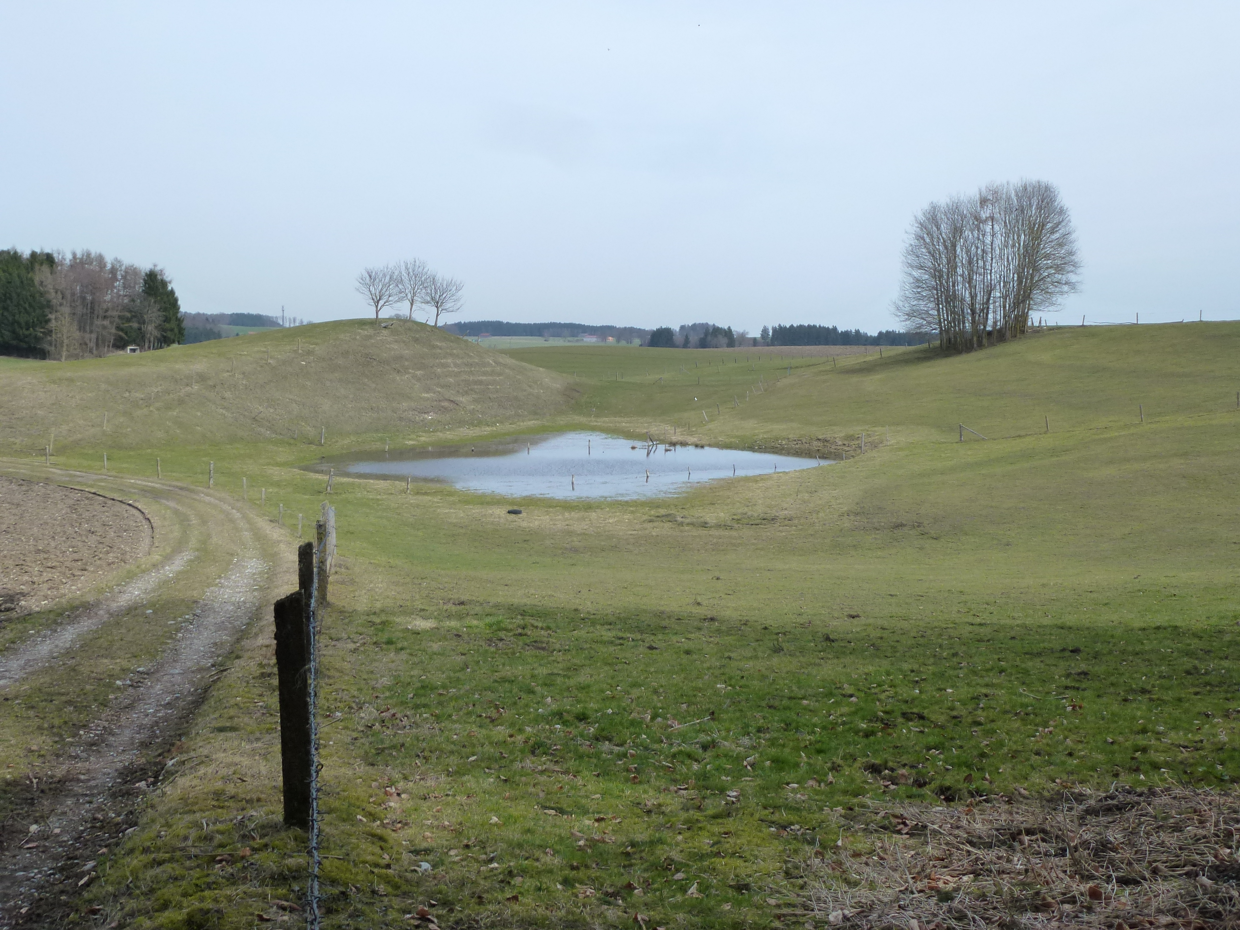 Toteisloch, ca. 60m nördlich der St 2056 zwischen Hagenheim und Memming, etwa 300m vor Memming . Ansicht von Westen